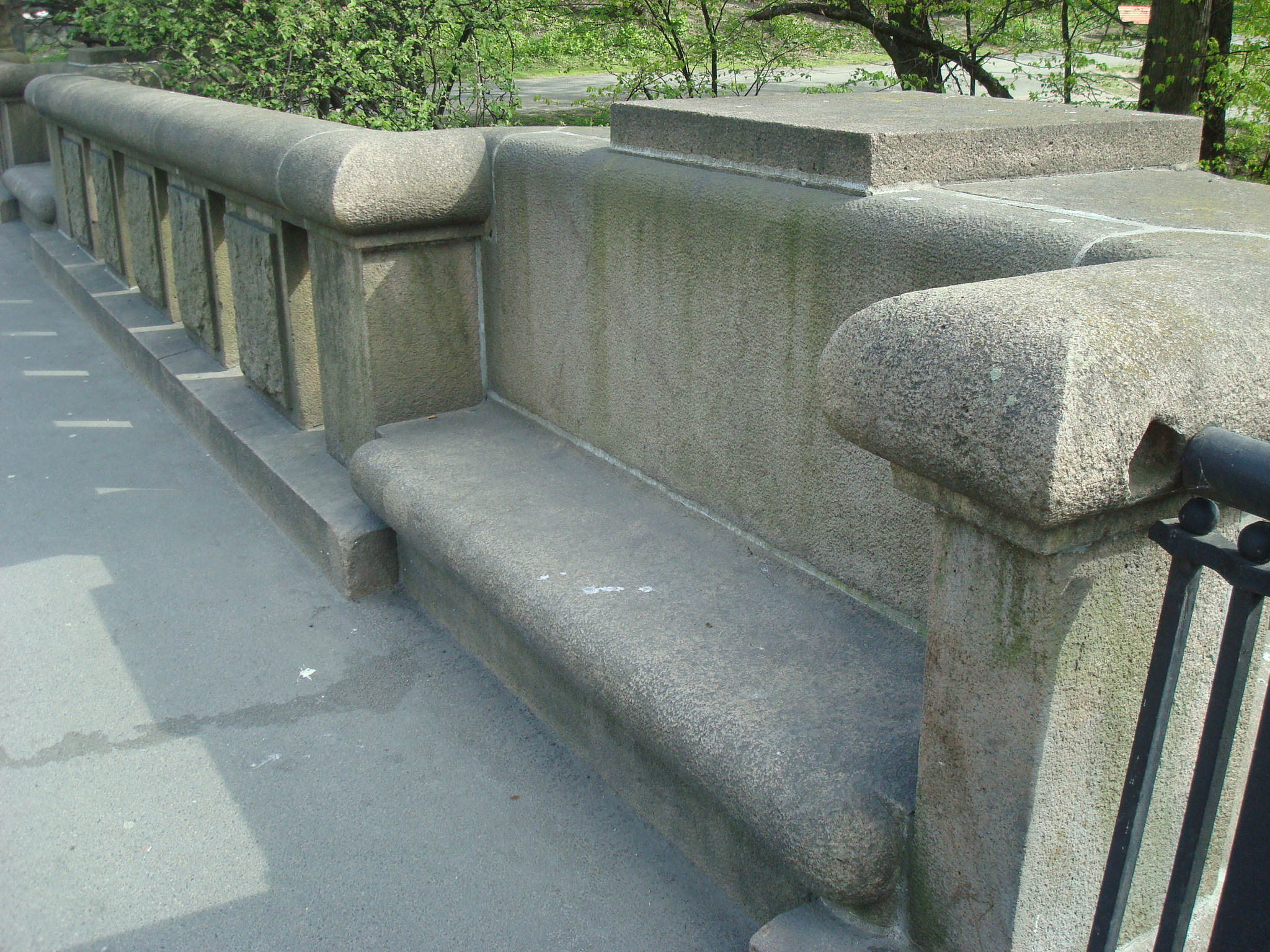 Sannerbrua i Oslo.